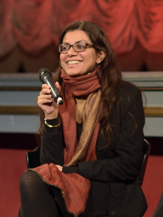 Alankrita Shrivastava på Skandia